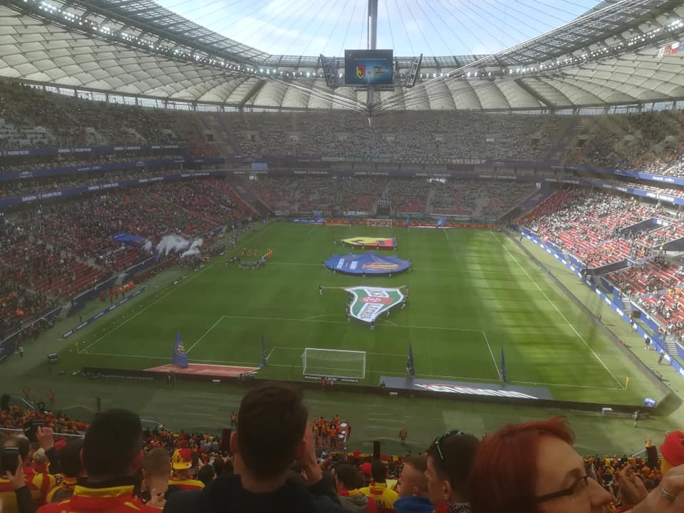 Finał Pucharu Polski 2018/2019 Jagiellonia vs Lechia Gdańsk